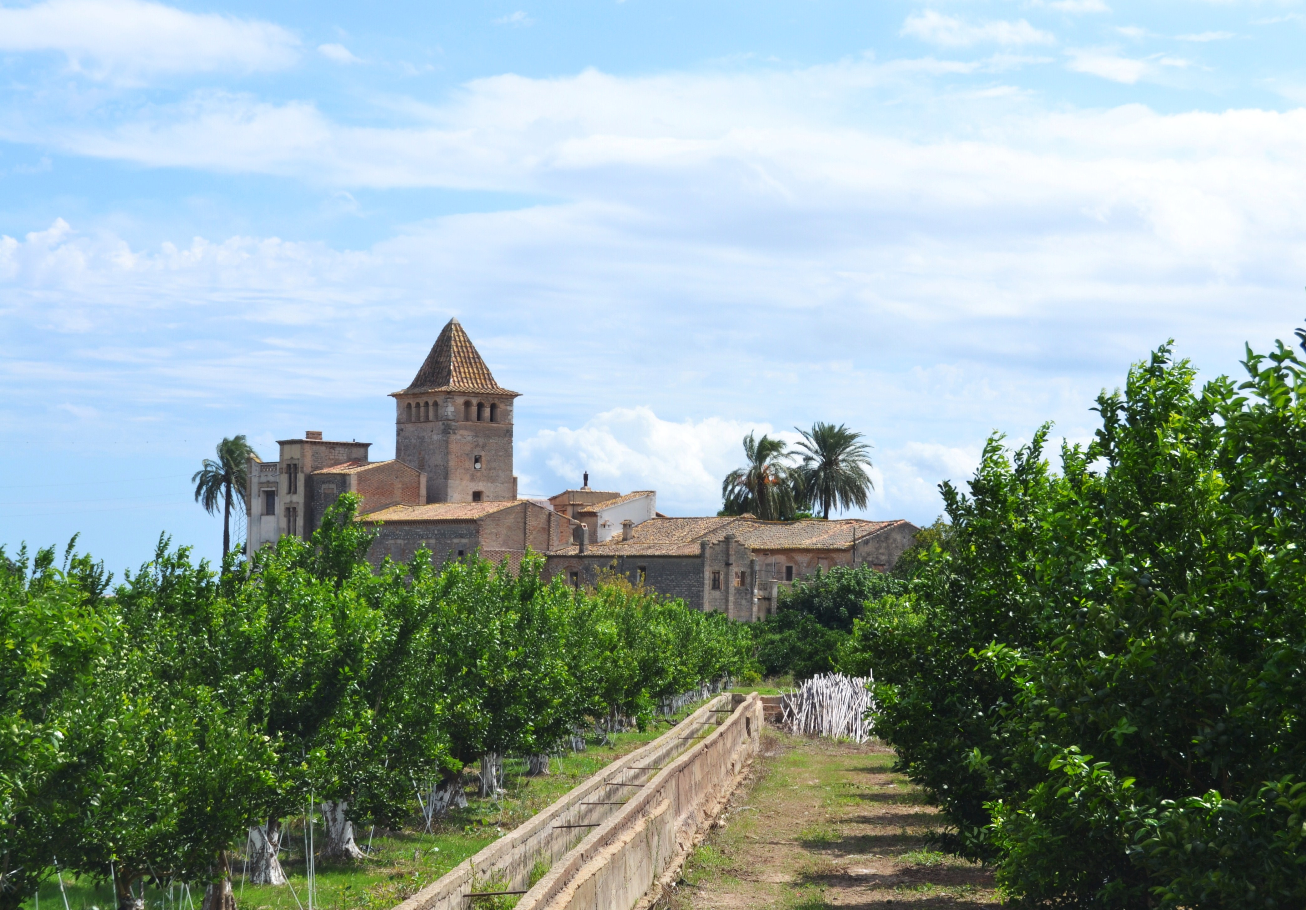 Alqueria fortificada de la torre dels Pares. 25.131-050.